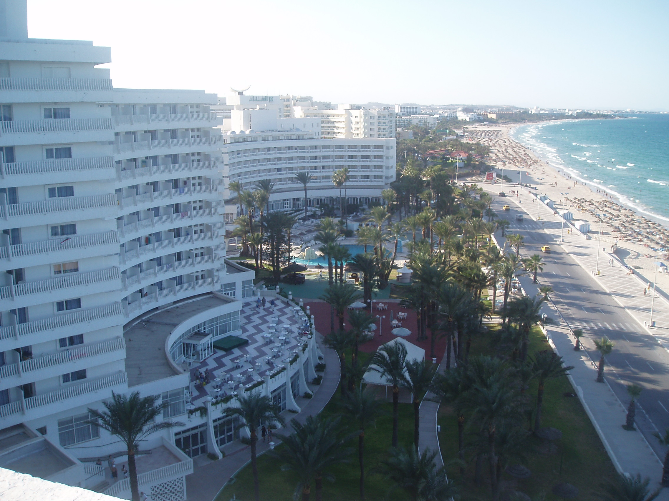 ElHana Beach 3* Sousse - вид с крыши на территорию отеля